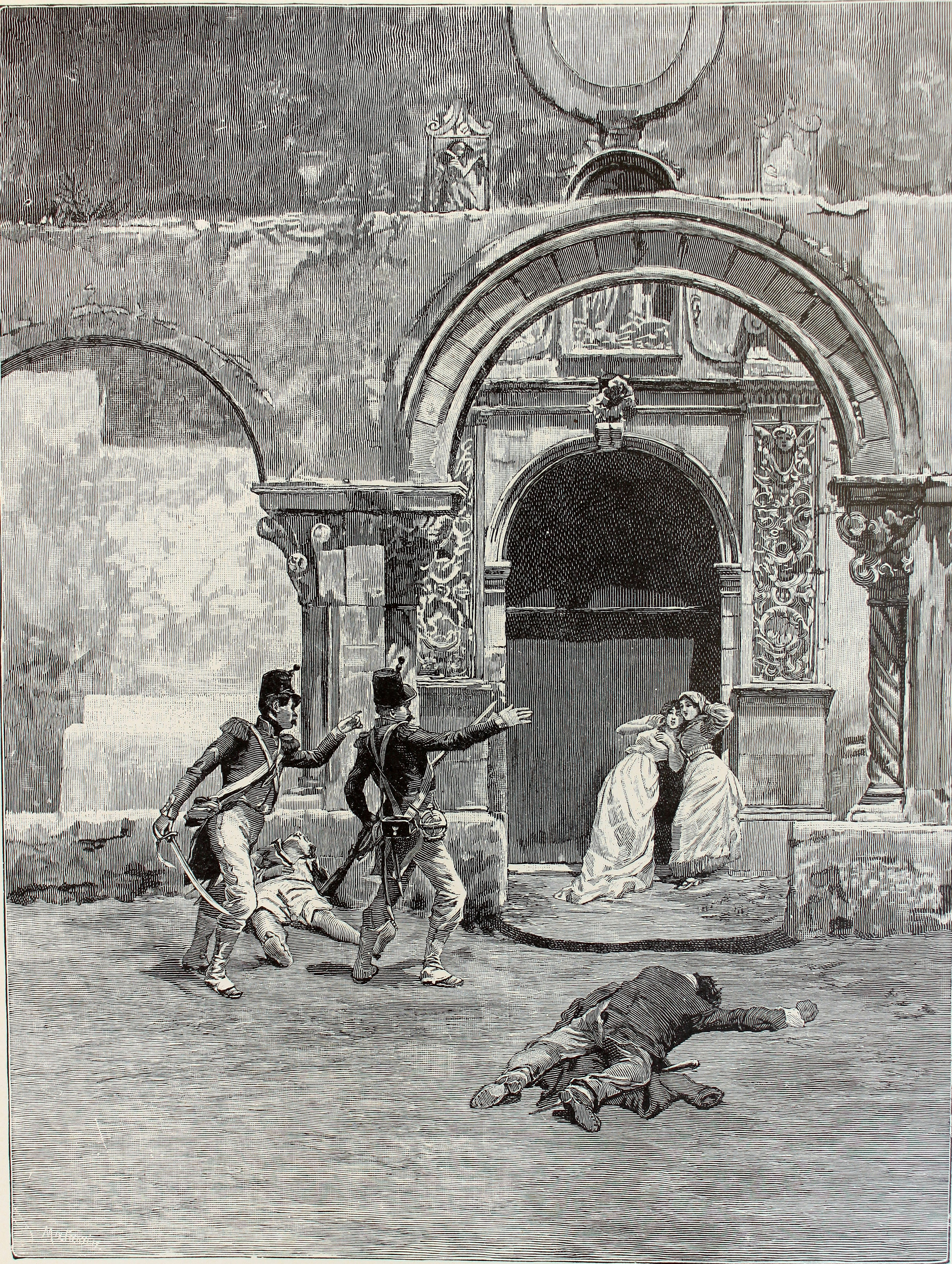 Le soldatesche di del Carretto a Siracusa Dopo la Rivolta del 1837, in Storia del Risorgimento italiano / il. Edoardo Matania - Milano Fratelli Treves, 1935. Edoardo Matania (1847-1929)